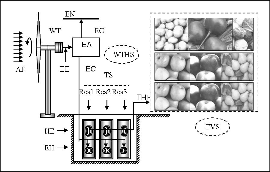 Вітротурбінна система теплопостачання фрукто-овочесховища